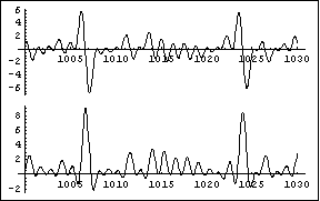 חלק המדומה ונממשי של פונקצת זתא של רימן לאורך הקו הקריטי. התמונה הוכנה על ידי עלומים בעזרת תוכנת "מתמטיקה".